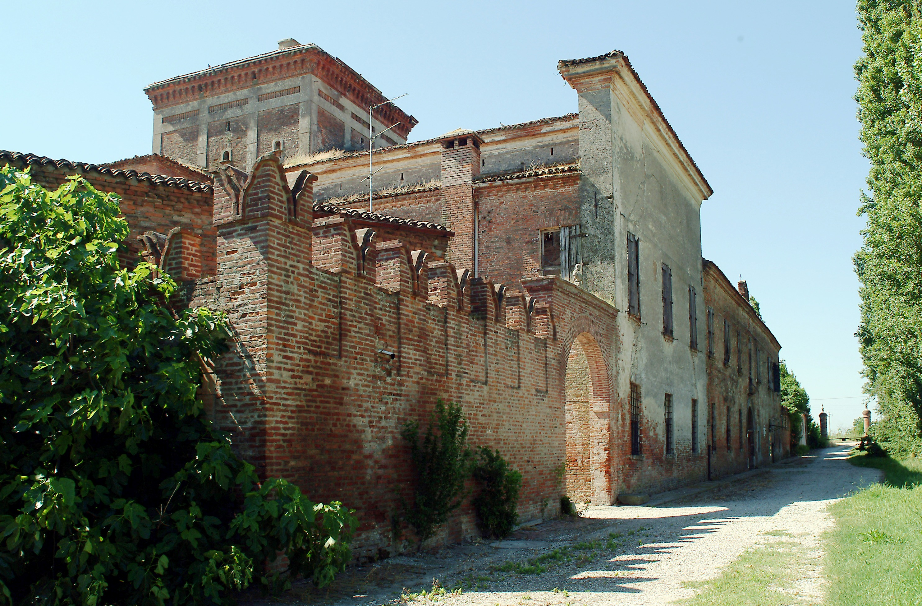 Villa della Mensa , facciata anteriore e ingresso